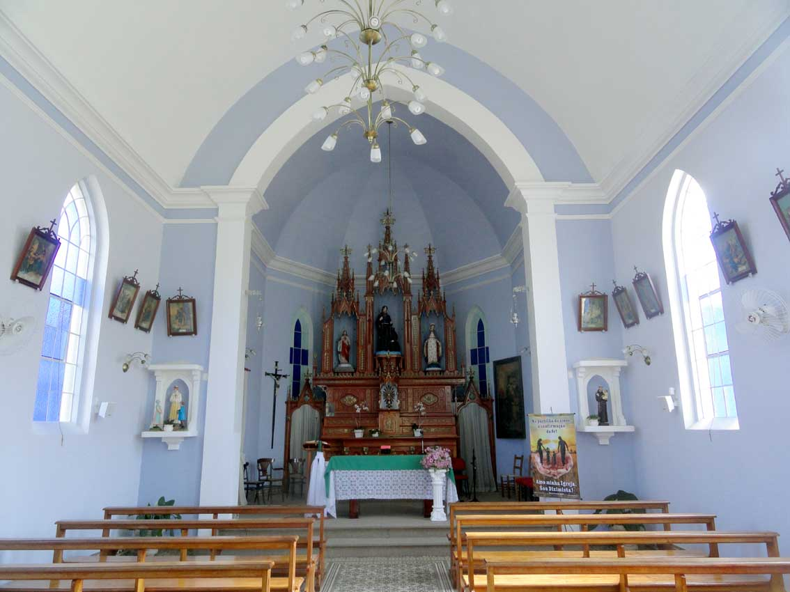 Igreja de São Romédio, erguida entre 1931-1933, Caxias do Sul